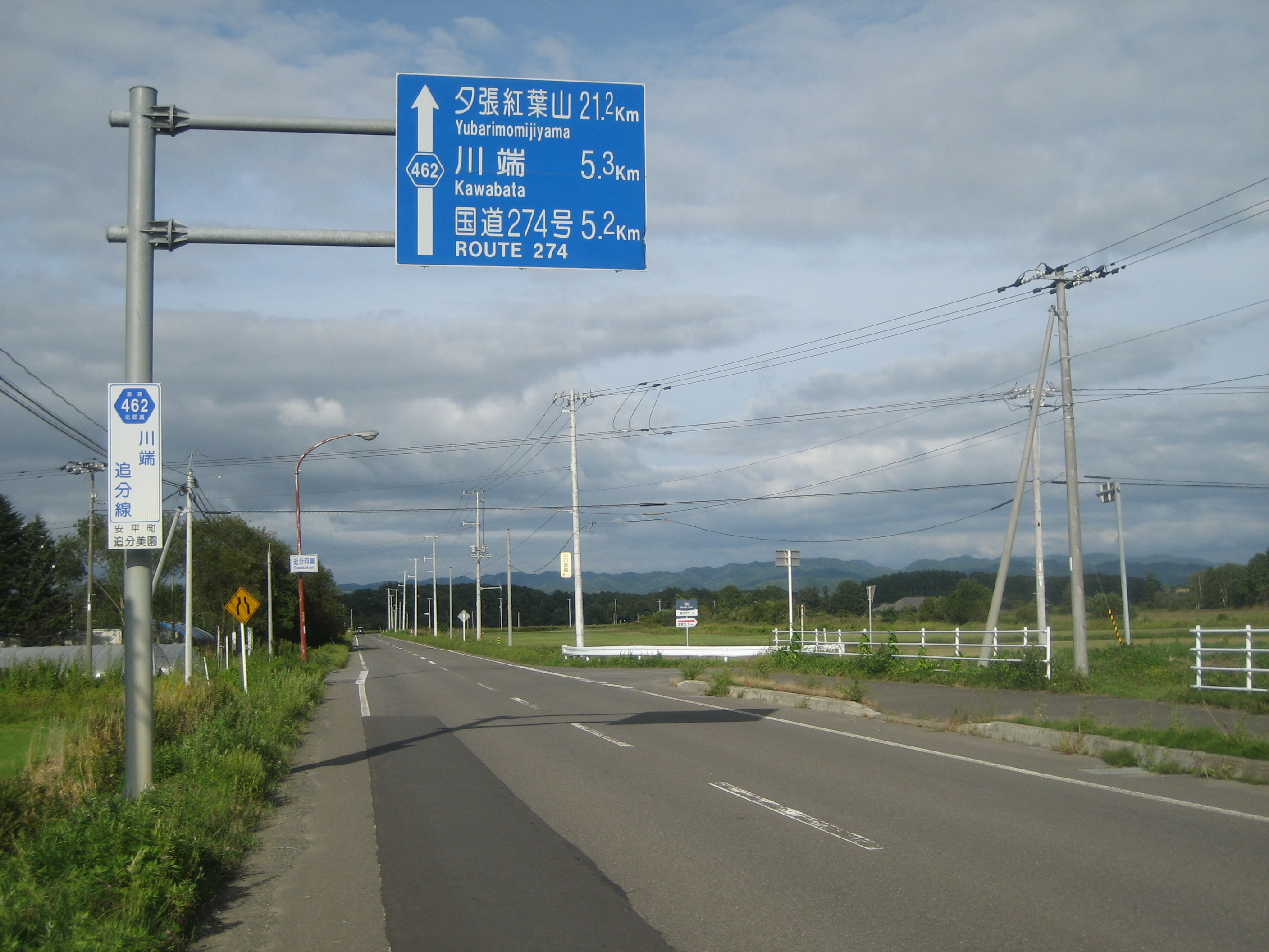 北海道道462号線安平町追分美園（夕張方面を撮影）